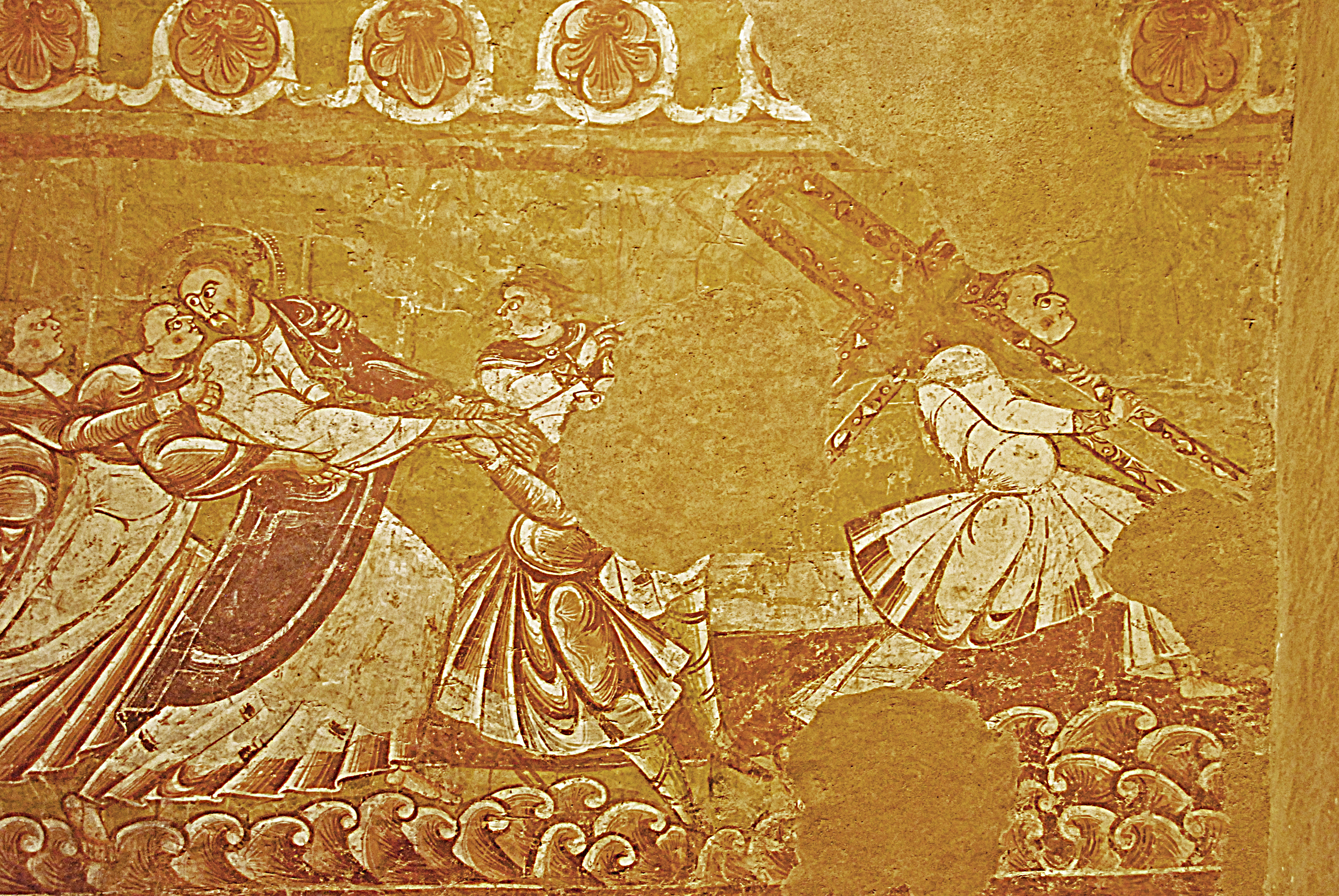 Chor, Nordwand, Kreuztragung, Simon von Cyrene